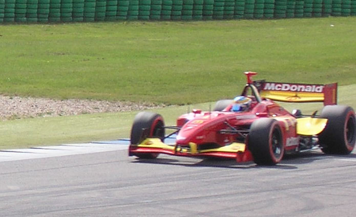 Sebastien Bourdais op het circuit van Assen.